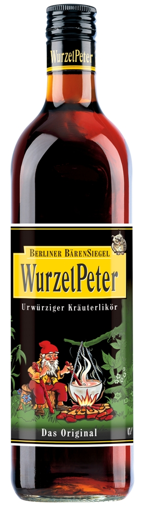 Flasche Wurzelpeter 0,7l